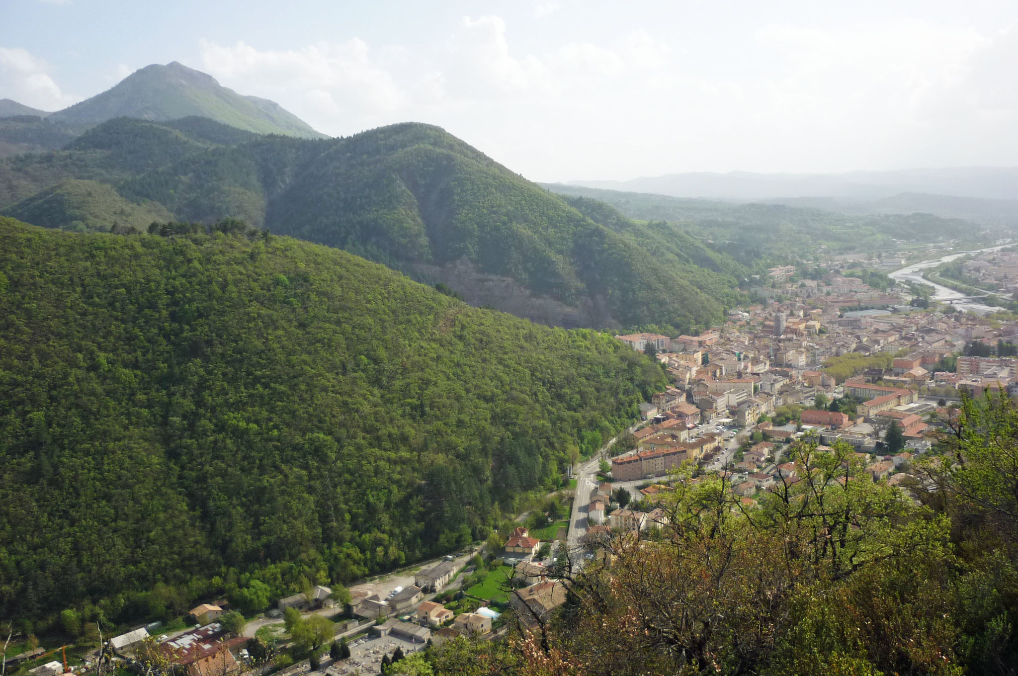 Blick auf Digne-les-Bains